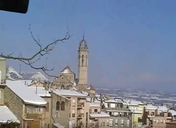 Imatge de la nevada del 8 de març de 2010 a la ciutat de Moià.